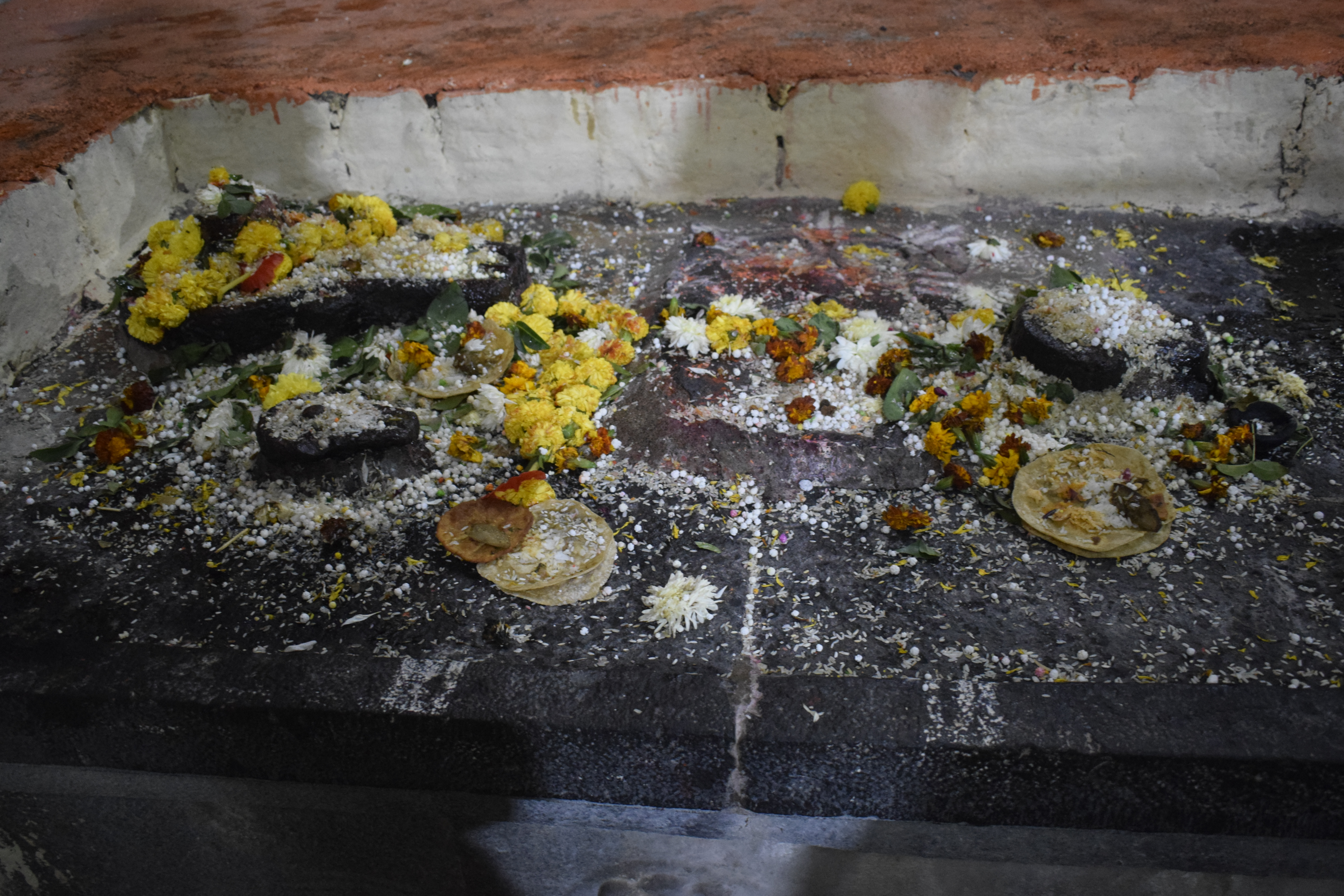 श्री कुठारसोमेश लिंग